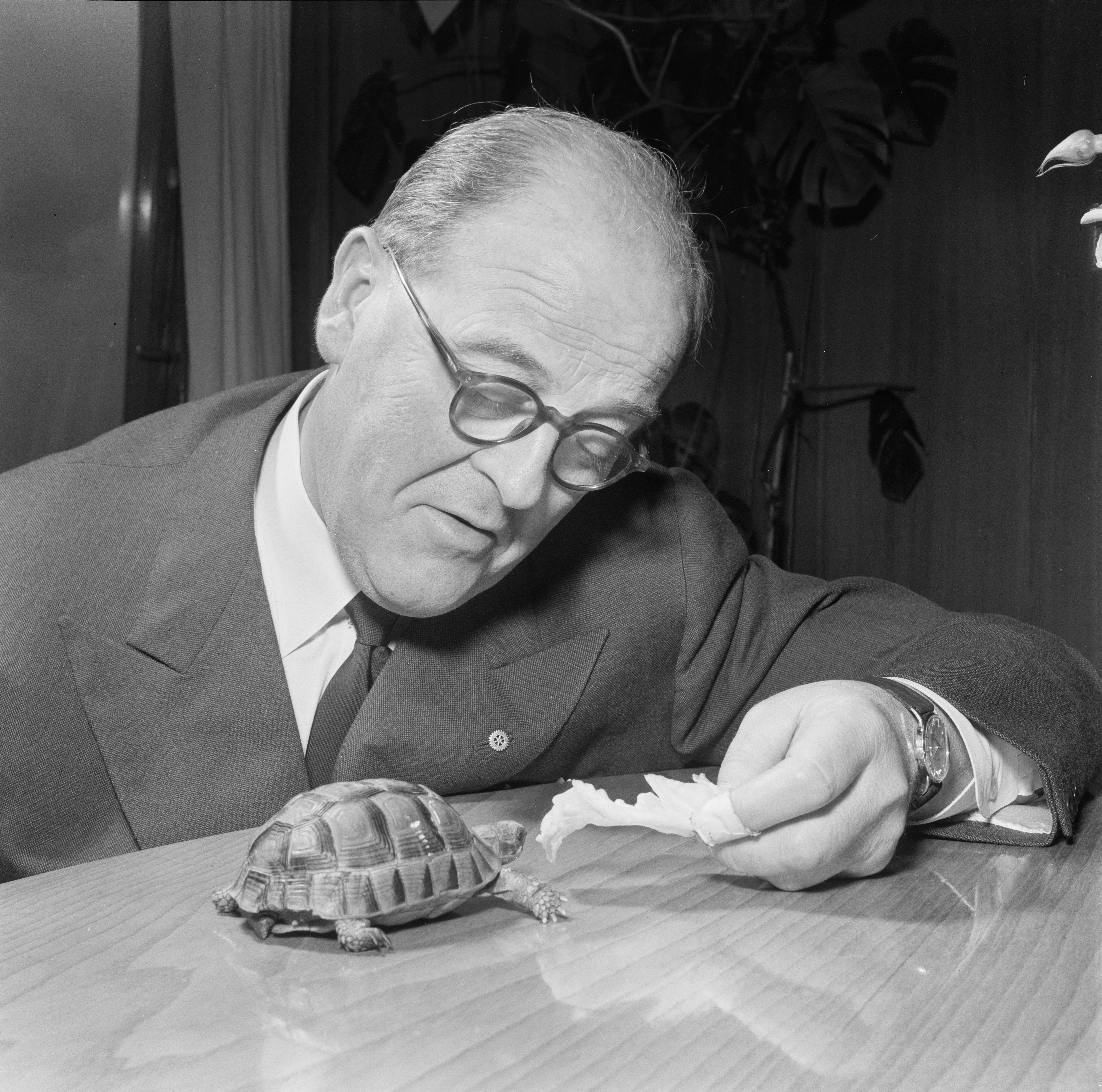 Bildet er hentet fra Arkivverket. Torsten Diesen, programsjef, sammen med Maja. NÅ nr. 21, 1954 Arkivinstitusjon : Riksarkivet Arkivnavn : Billedbladet NÅ Sted : Norge, Ukjent, Ukjent, Ukjent Emneord: Skilpadder, Programsjefer, Portretter, Menn Avbildet: Diesen, Thorstein